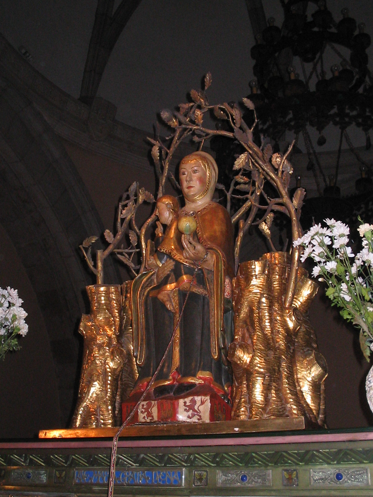 Imagen de la Virgen de Valvanera, situada en el Monasterio de Valvanera (La Rioja).